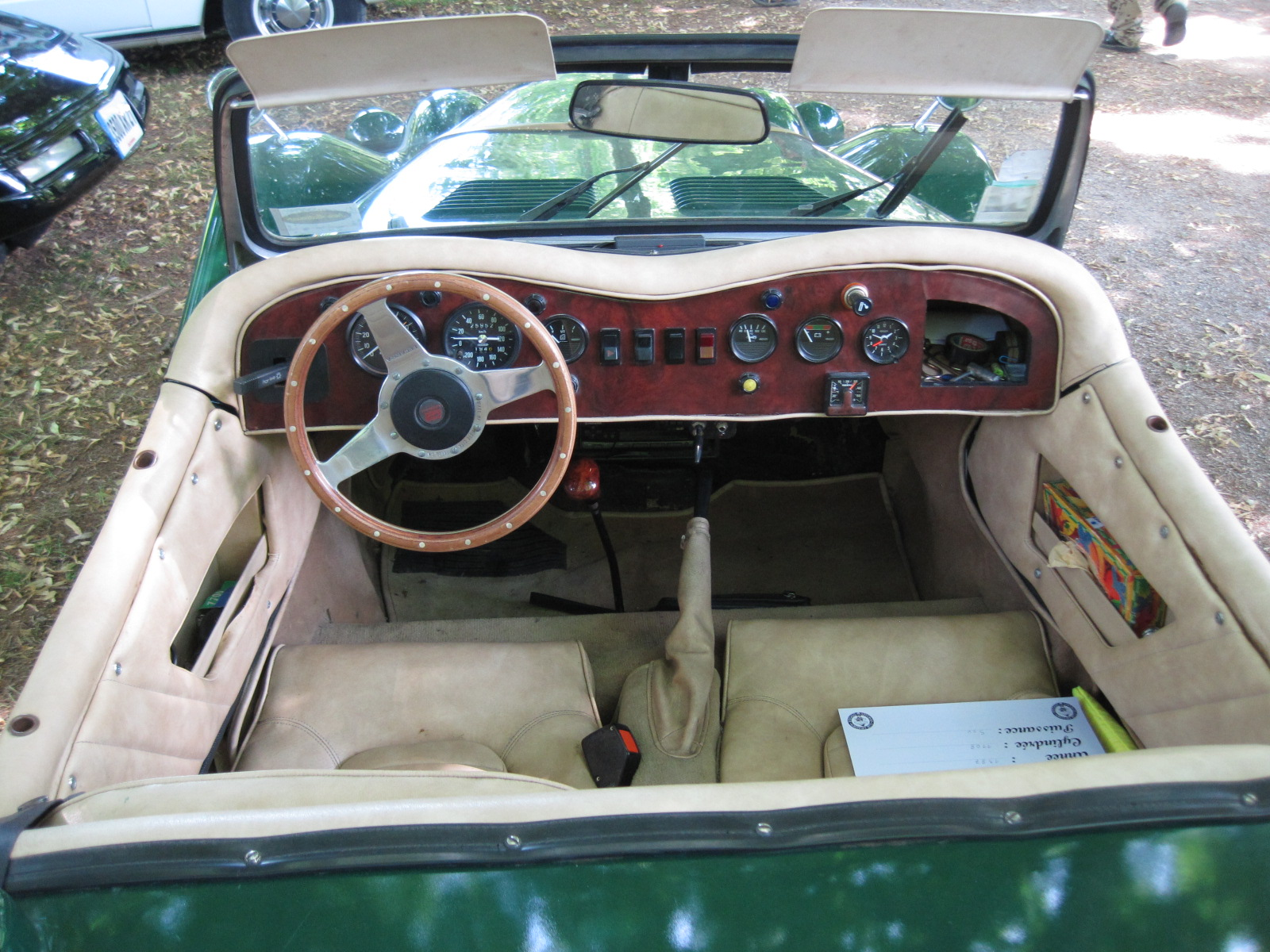 SMS Tilbury